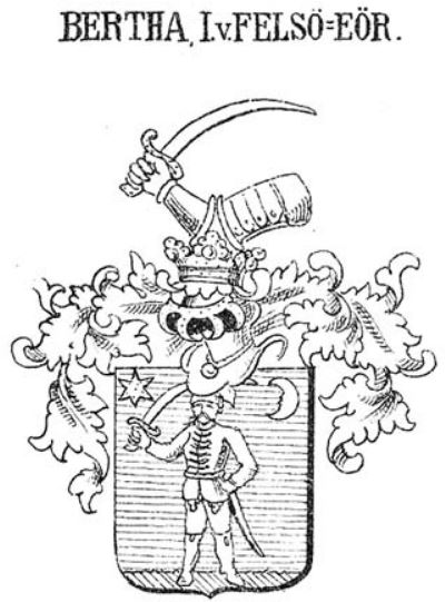 A felsőeőri Bertha család cimere. Siebmacher könyvből